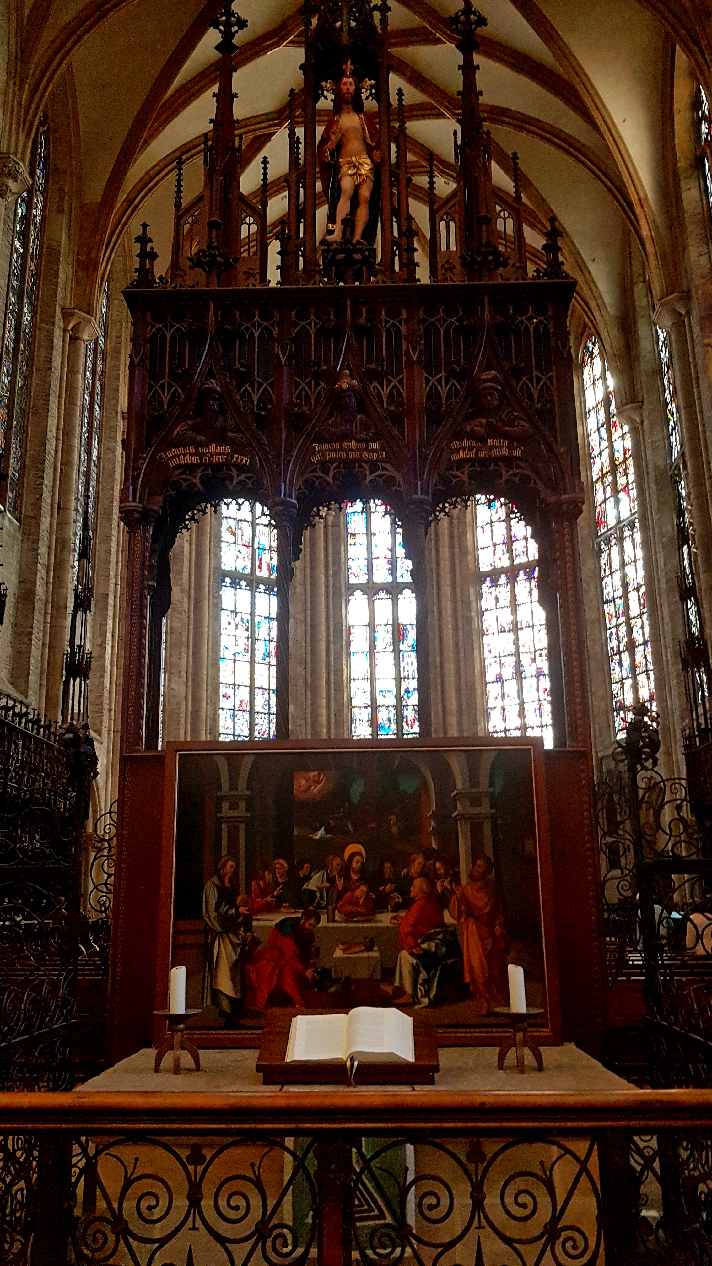 Ulmer Münster, Kreuzaltar mit Abendmahlsbild unterm Chorbogen.